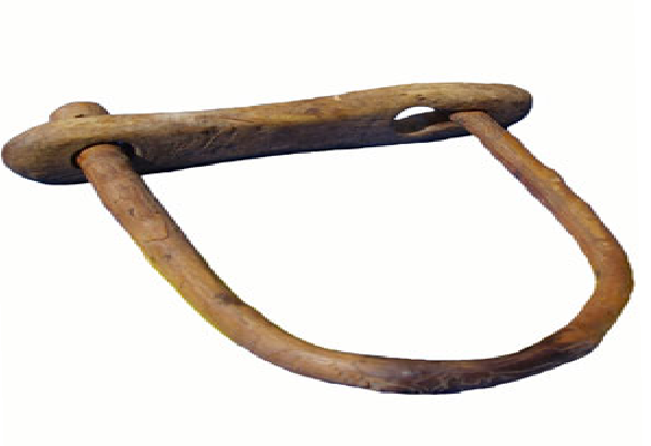 Kreatursklave till att binda boskap